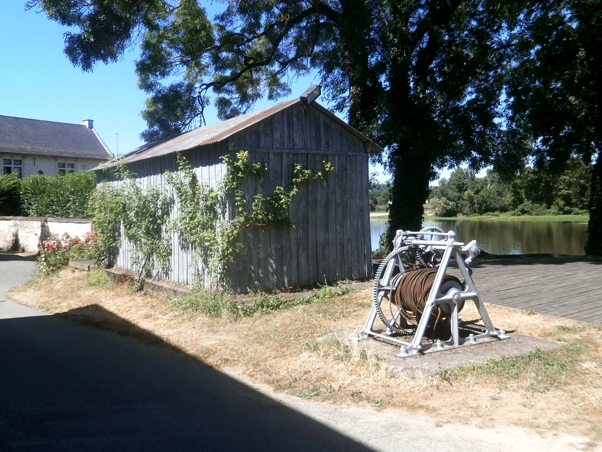 Le treuil de l'ancien bac et la maison du passeur (Candes-Saint-Martin)